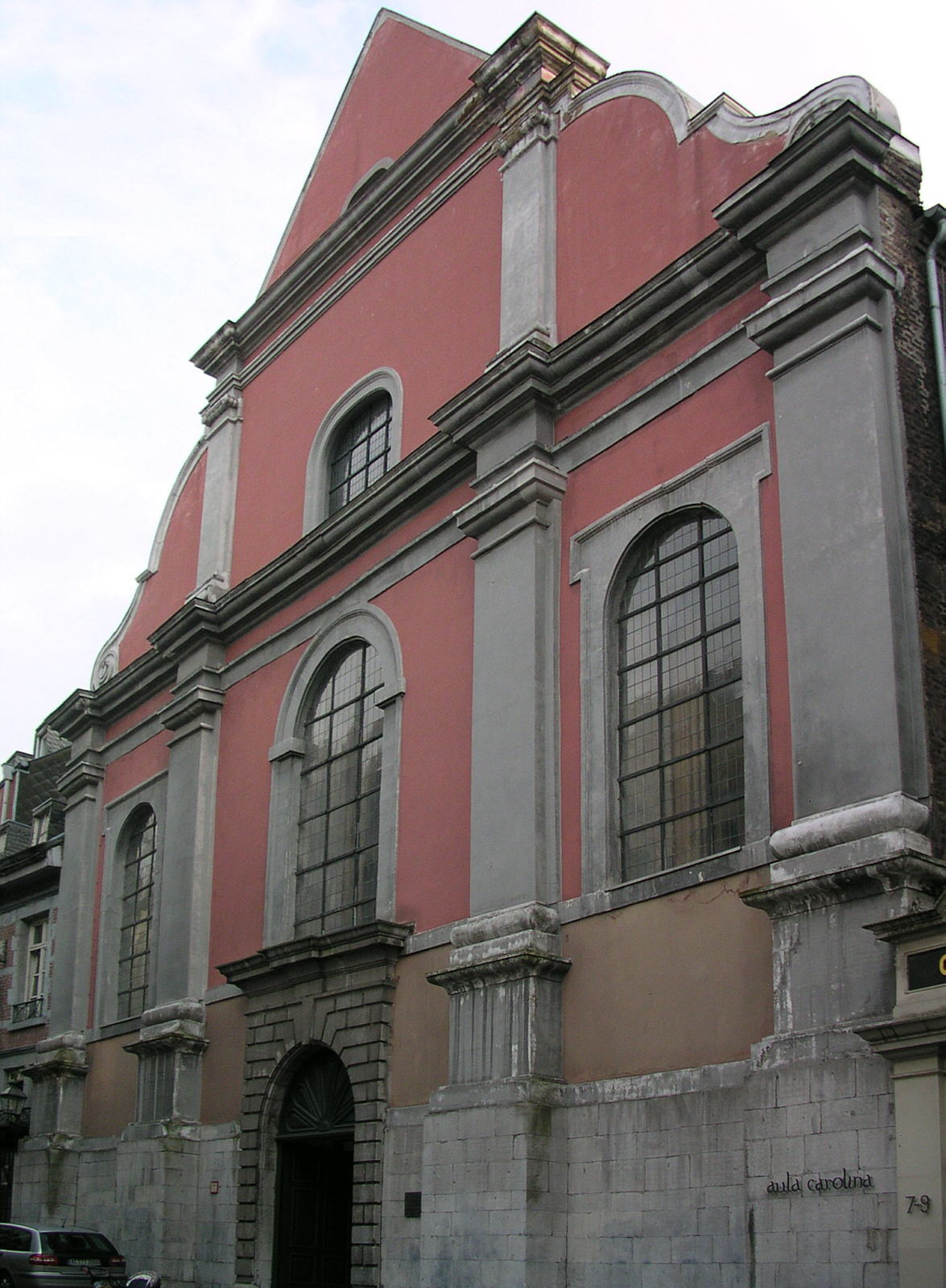 Aachen, Pontstraße, Aula Carolina, ehemalige Klosterkirche. Erstmals erwähnt wird der Bau im 13. Jahrhundert, der Grundstein zum noch heute stehenden Gebäude wurde am 11. Mai 1663 gelegt. 1980 saniert ist sie heute Schulaula des Kaiser-Karls-Gymnasiums und Ausstellungshalle